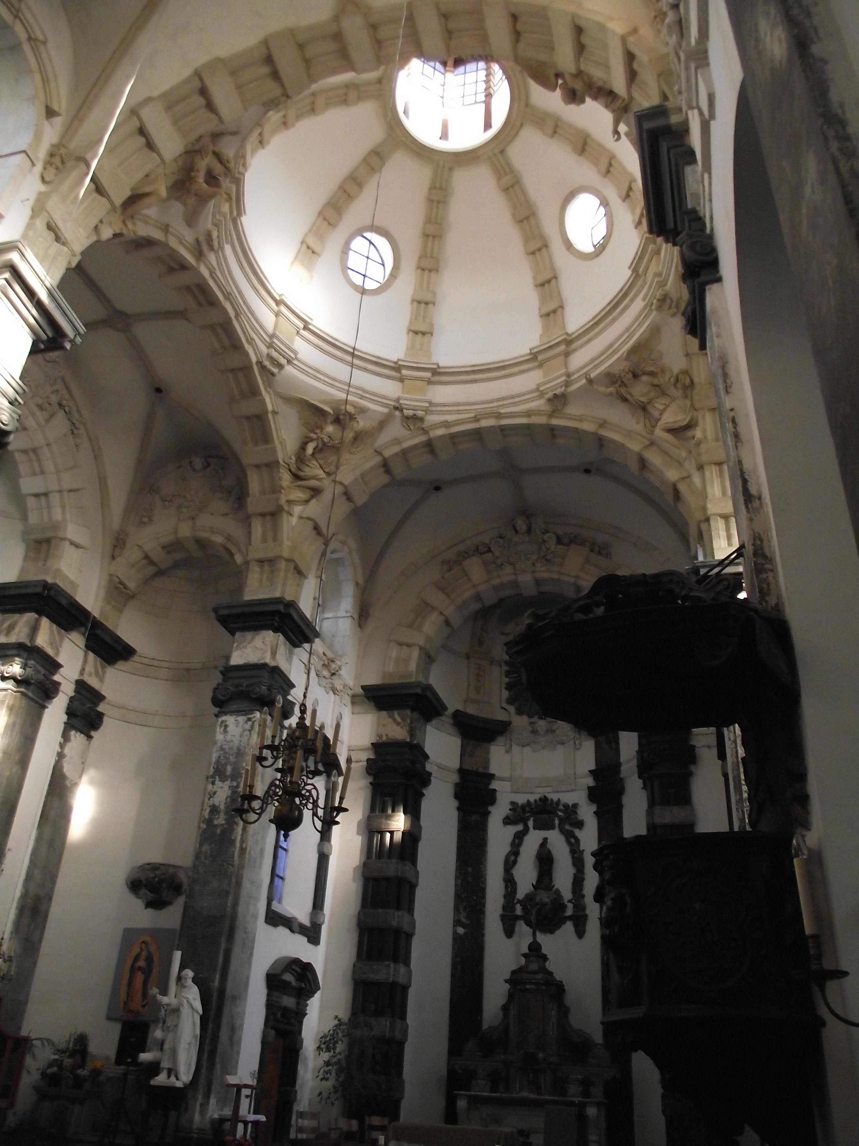 Bruxelles, Chiesa della Madonna delle Clarisse, L.Faydherbe, 1665-70